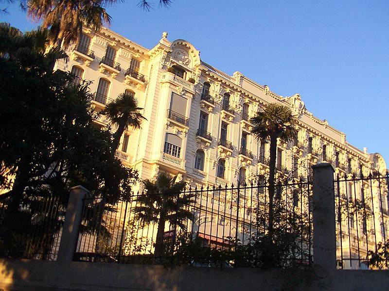 Les palais de Nice. Epoques diverses. Iconographie Construit en 1906. Il domine Nice. Architecte : Charles DALMAS Transformé en vaste copropriété (date?)